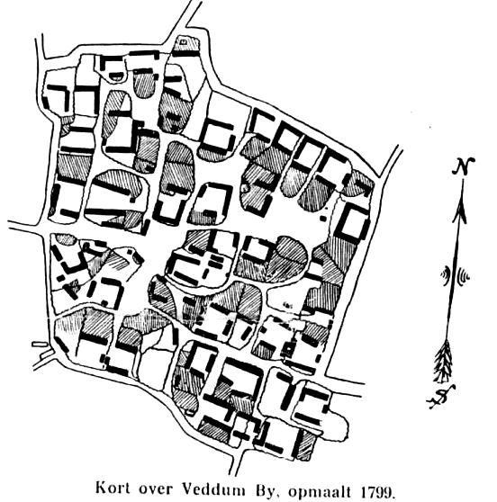 Kort over veddum i 1799. Kortet er udlånt af Lokalhistorisk arkiv i Veddum